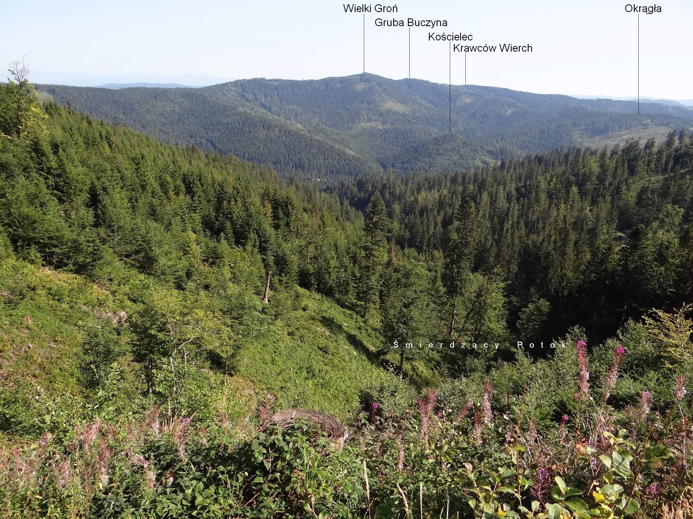 Widok z niebieskiego szlaku Złatna - Hala Lipowska